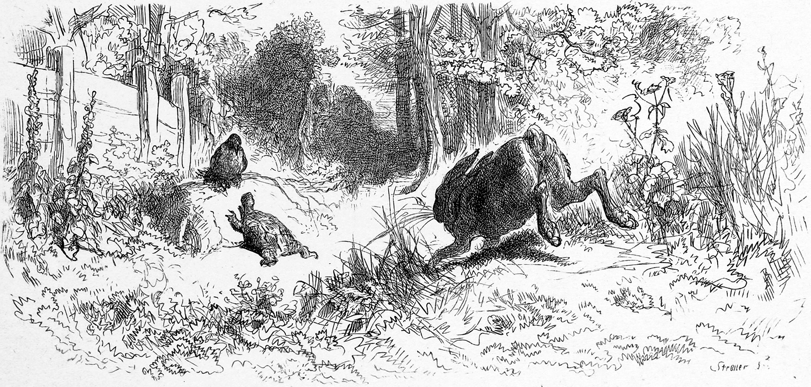 grafika z książki PL Bajki, Jean de La Fontaine, nakładem i drukiem Jana Noskowskiego, Warszawa 1876